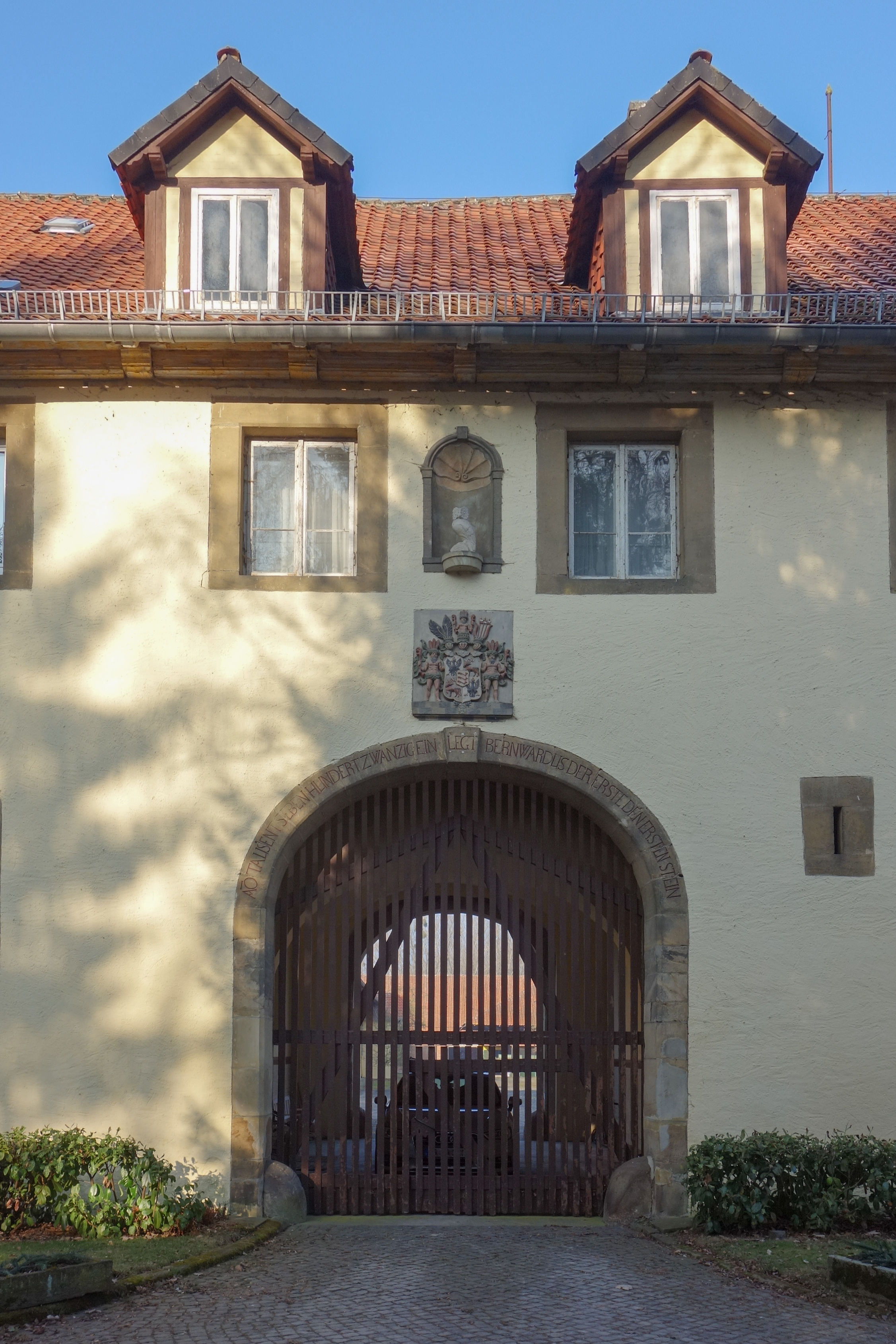 Gutsgebäude von Söderhof (Gemeinde Haverlah) - Eingangsportal mit dem Wappen der Familie von der Schulenburg. Die Inschrift des Erbauers auf dem Torbogen von 1721 lautet: „A(NN)O TAUSENT SIEBENHUNDERT ZWANZIG EIN LEGT BERNWARDUS DER ERSTE DEN ERSTEN STEIN“ TAUSENT SIEBENHUNDERT ZWANZIG EIN LEGT BERNWARDUS DER ERSTE DEN ERSTEN STEIN“ TAUSENT SIEBENHUNDERT ZWANZIG EIN LEGT BERNWARDUS DER ERSTE DEN ERSTEN STEIN“